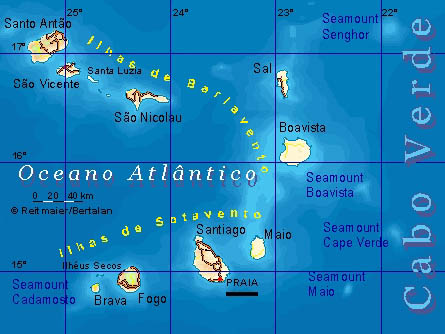 Bela-vista-net-Cabo-Verde-map.jpg. Bela-vista-net-Cabo-Verde-map.jpg.